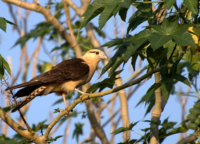 Milvago chimachima Antiga estrada de terra Piraju / Sarutaiá, próximo à baixada da neblina...